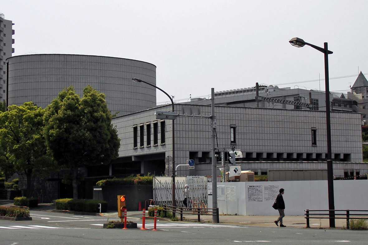 多摩市都市廃棄物管路収集センター跡地